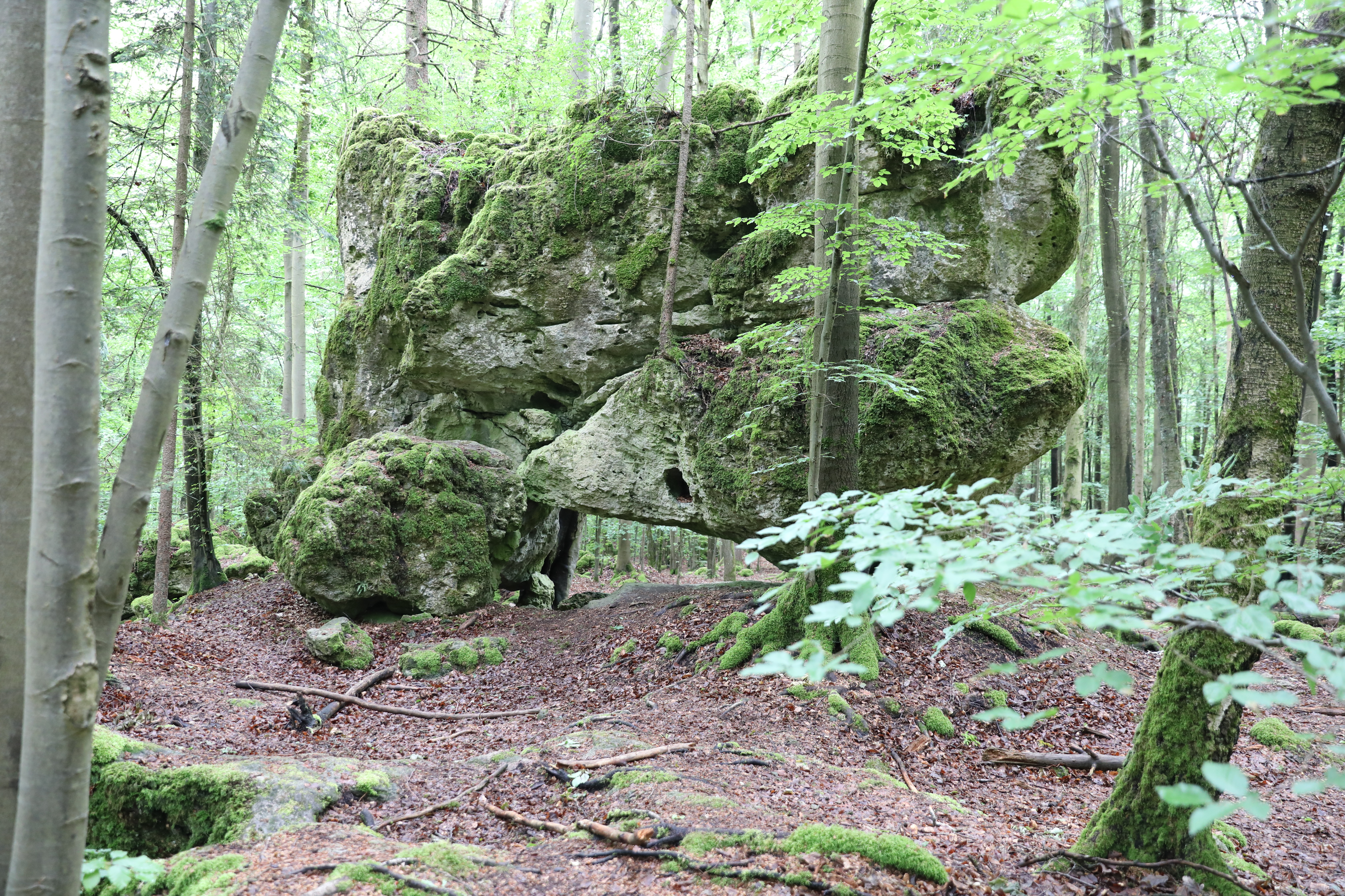 Felsenlabyrinth bei Eichig, Lichtenfels